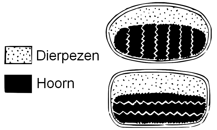 Nederlandstalige bewerking van Wikimedia Commonsbestand Hornbow-crossection.svg